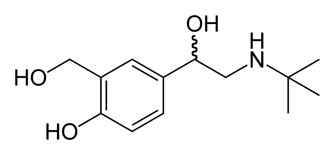 Skeletal formula of racemic salbutamol